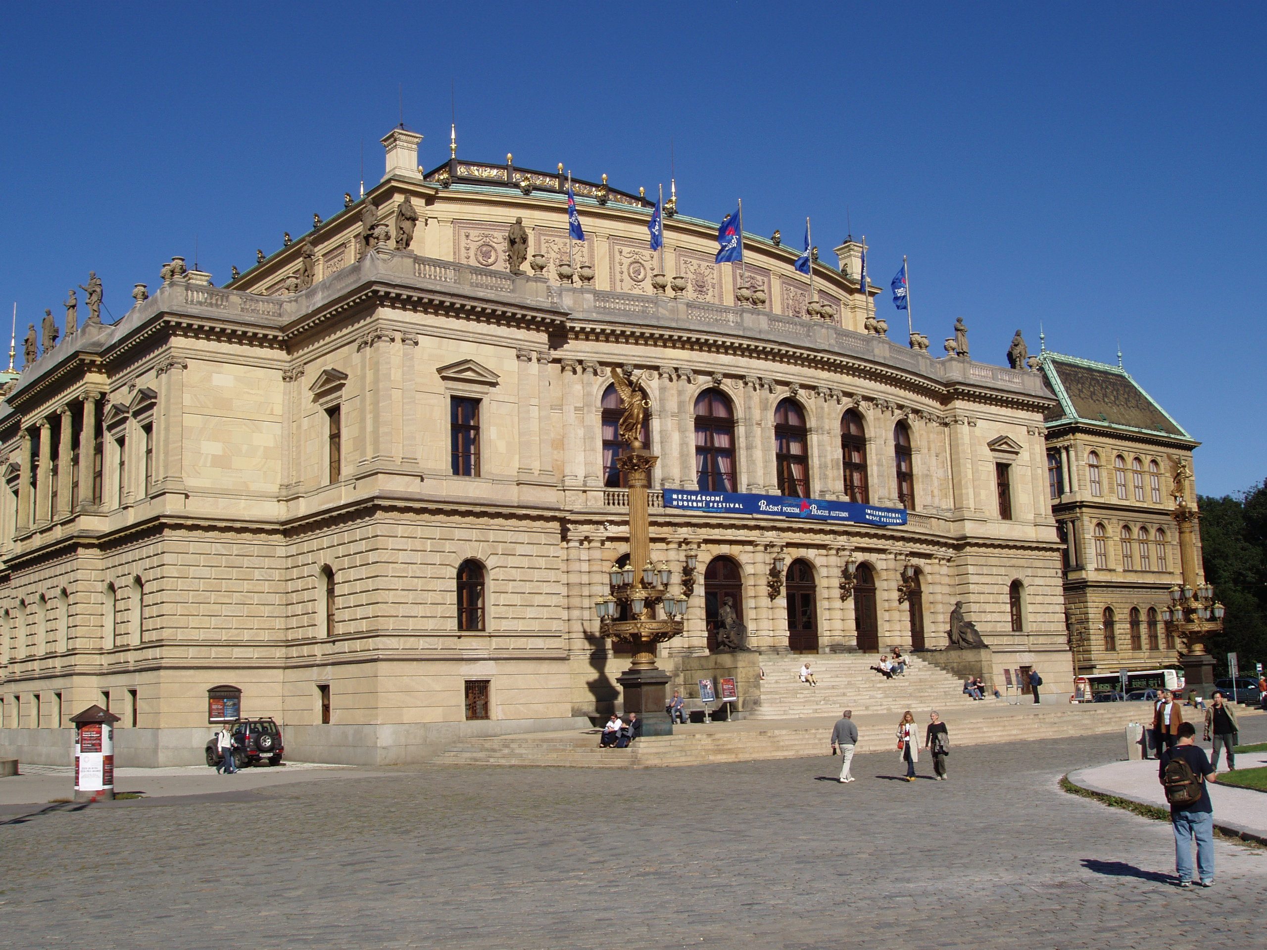 Rudolfinum